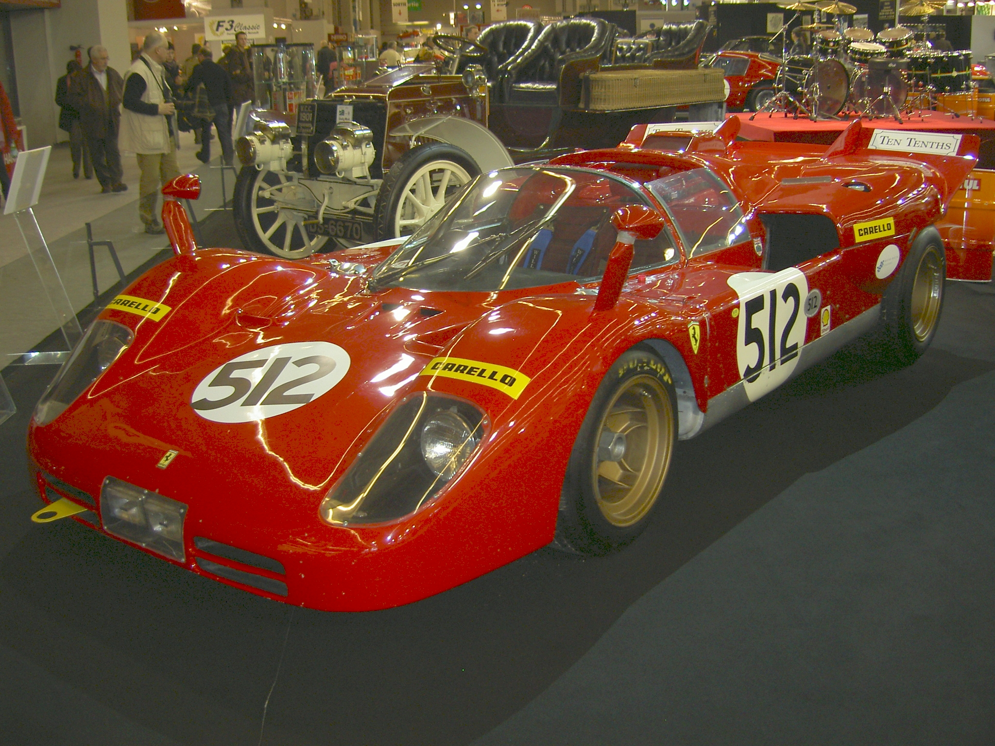 Ferrari 512 S (Owner : Nick Masson).